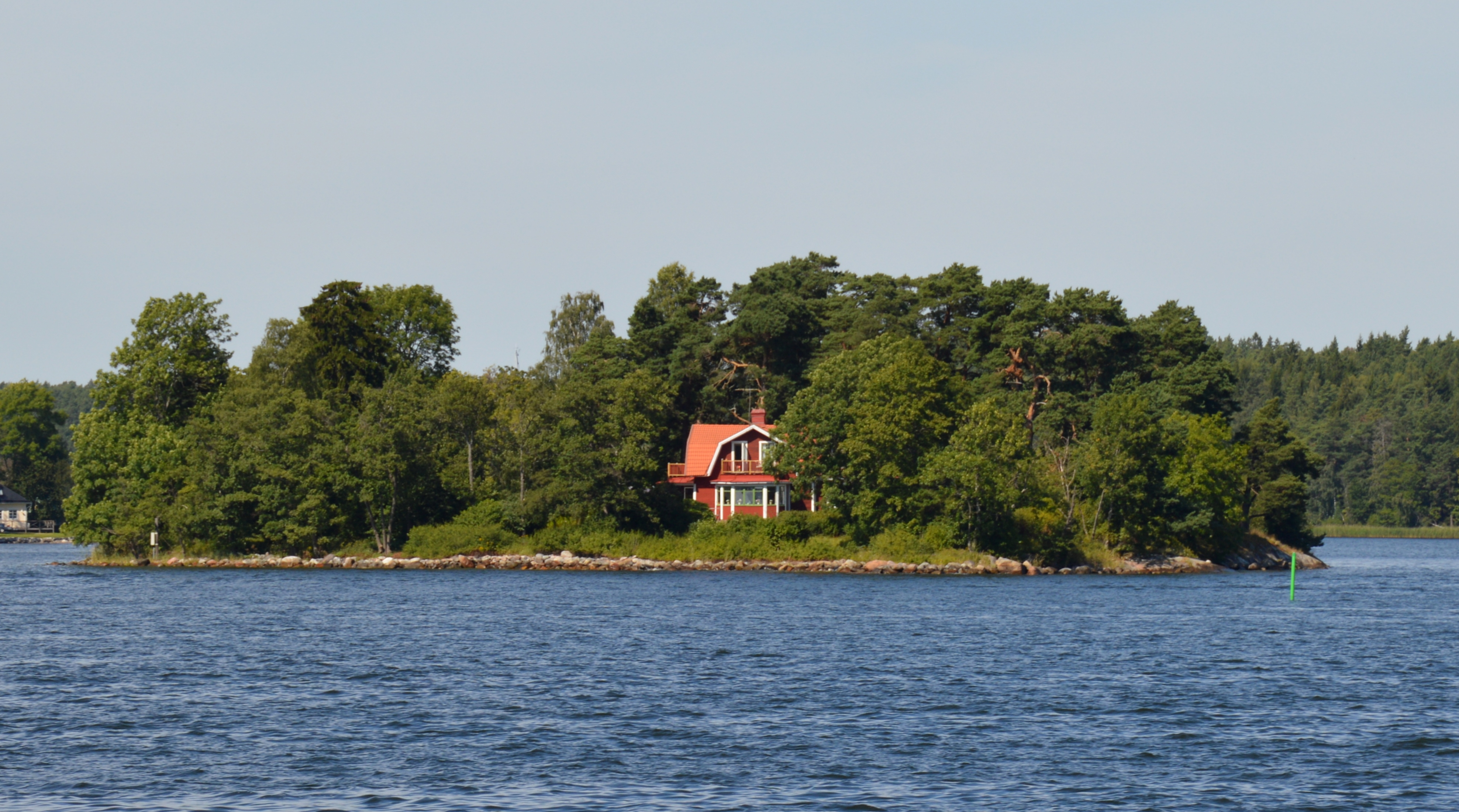 Jungfruholmen